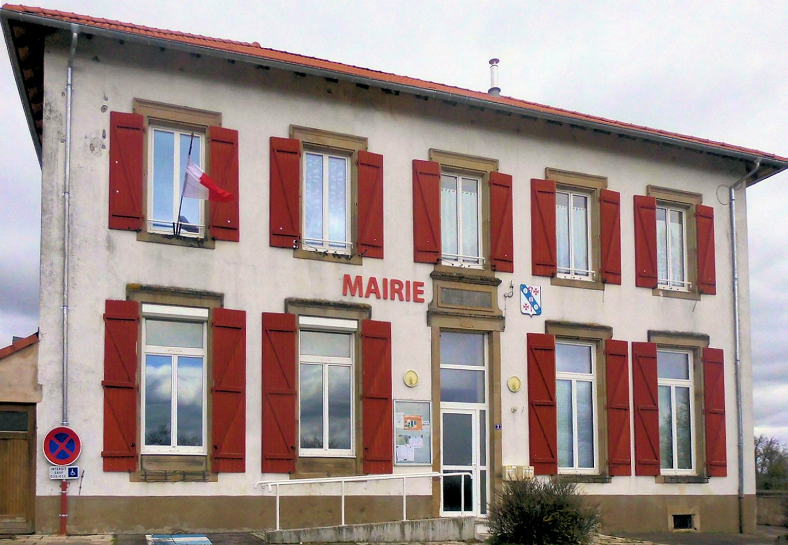 La mairie de Moriviller